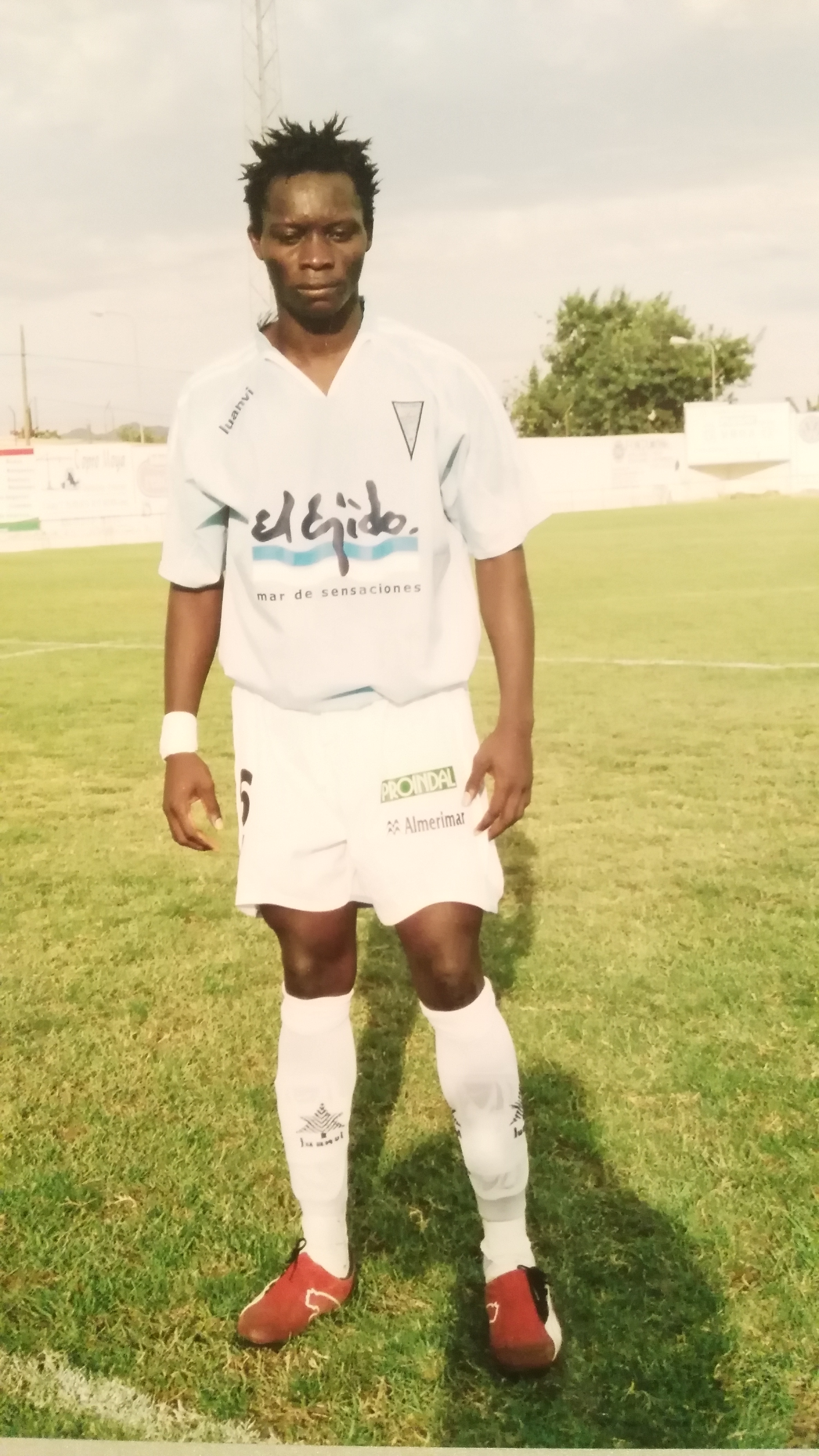 addison